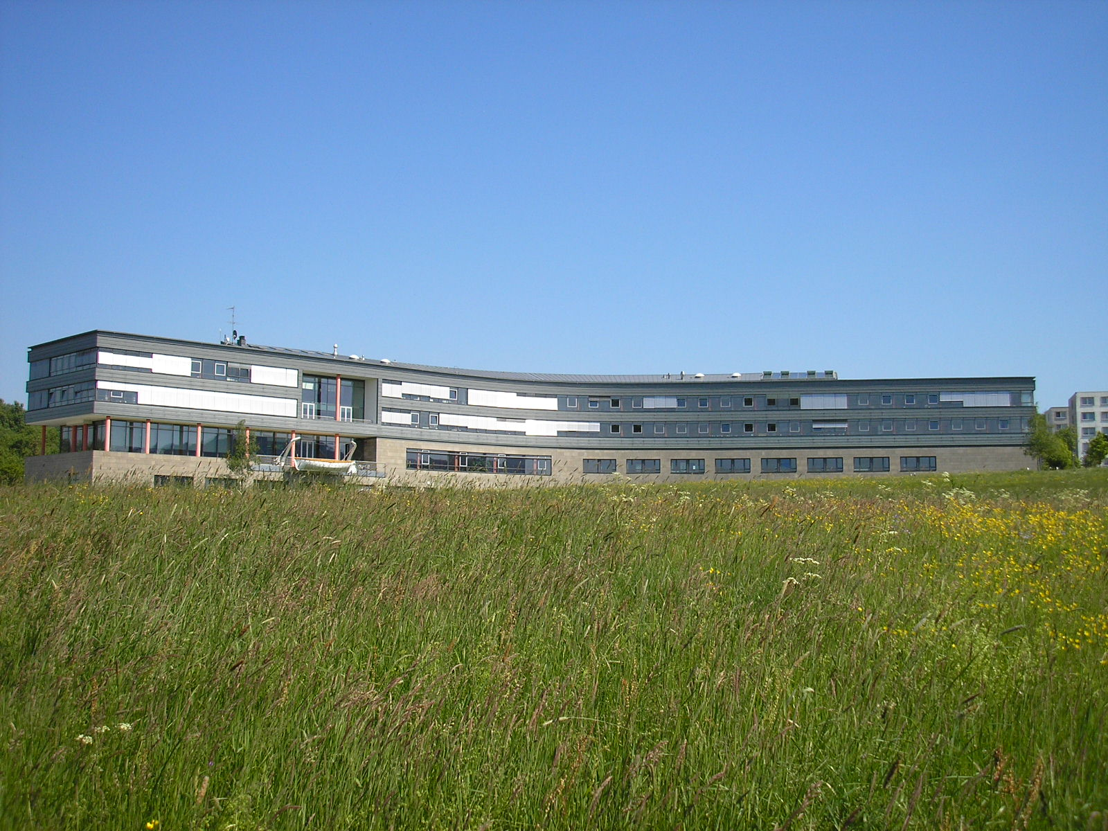 Das Gebäude der Bundesanstalt für Wasserbau in Ilmenau.